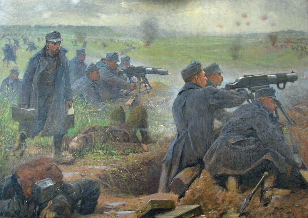 Abwehrkampf einer MG-Abteilung. Maschinengewehrabteilung II des Infanterieregiments Nr. 4 "Hoch- und Deutschmeister" auf der Höhe Gora Sokal am Bug, 20. Juli 1915